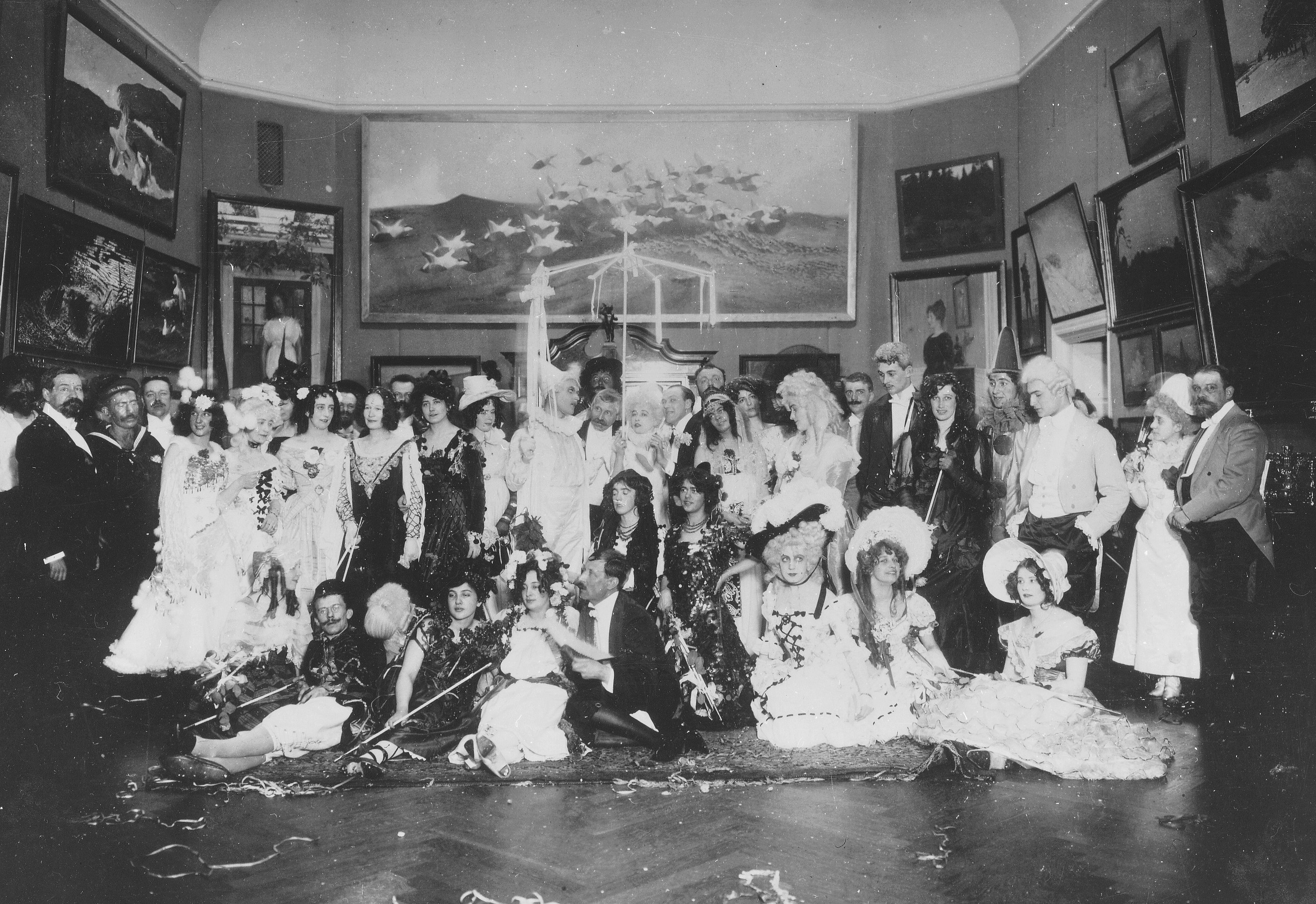 Villa Eolskulle (Thielska galleriet) invigningsfest Rosenmaskeraden i västra/högra salen. Fotografi från invigningsfesten, Rosenmaskeraden. Några av gästerna på bilden: Sittande längst till vänster: Sven Lidman med hustru Carin Thiel Sittande i mitten: Ragnar Östberg Sittande andra från höger: Signe Thiel Stående från vänster: Georg Pauli, Karl Wåhlin, Eugéne Jansson och Hjalmar Söderberg. Stående från höger: Klas Fåhraeus och Axel Törneman. Byggherren och gästgivaren Ernest Thiel syns längst bak mellan kvinnorna rakt över Sven Lidman.